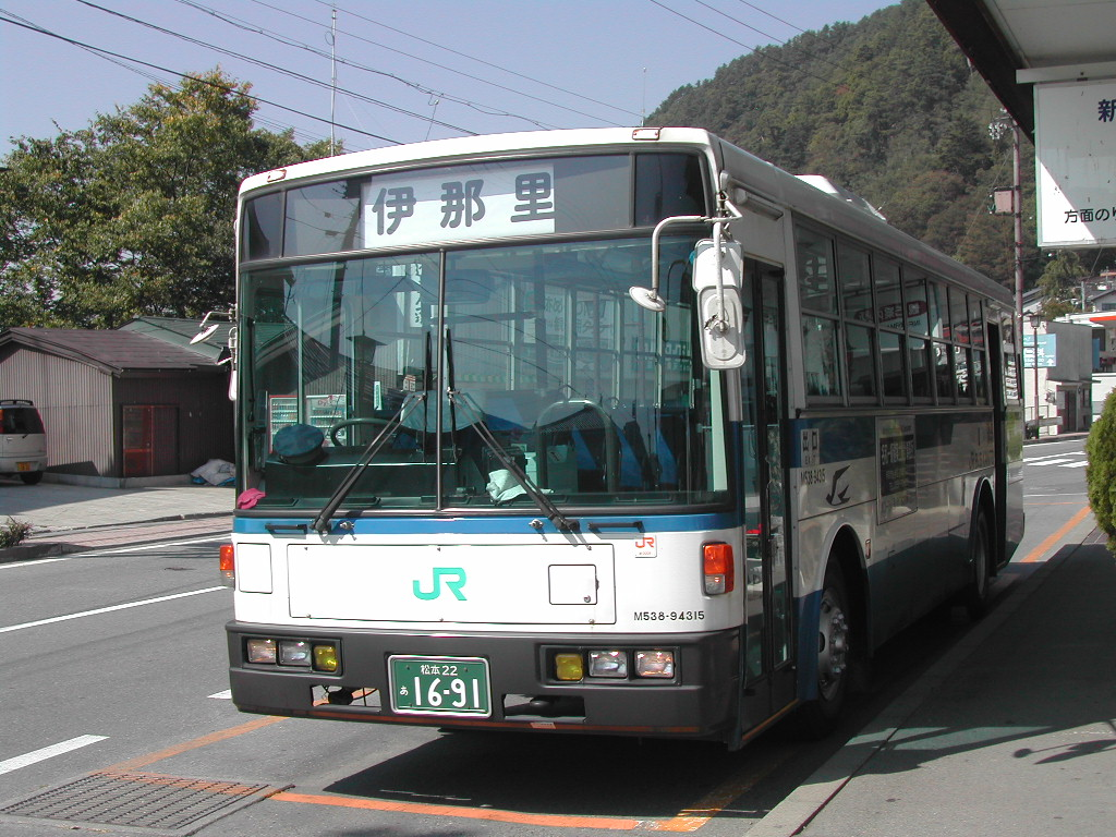 高遠駅にて撮影